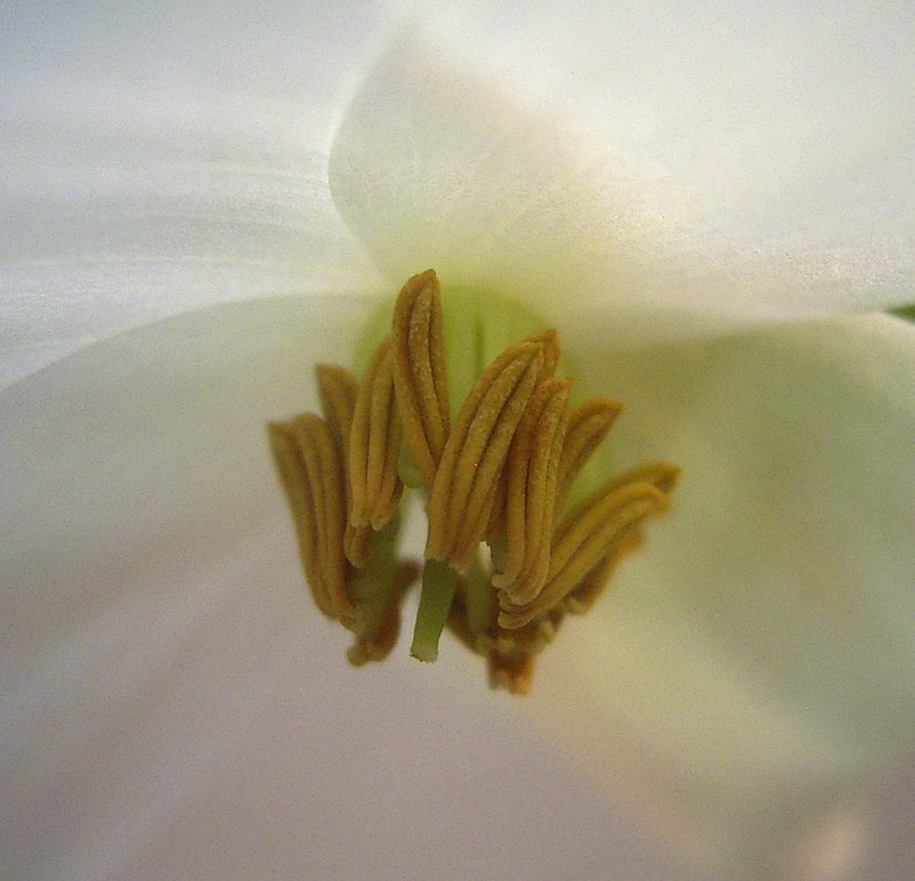 Flora Heliamphora nutans